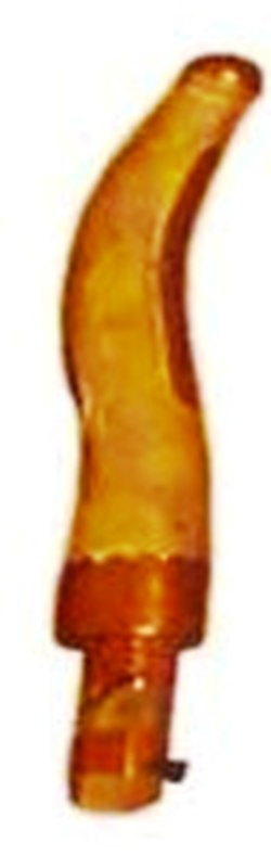 ഒറ്റ-കോൽ